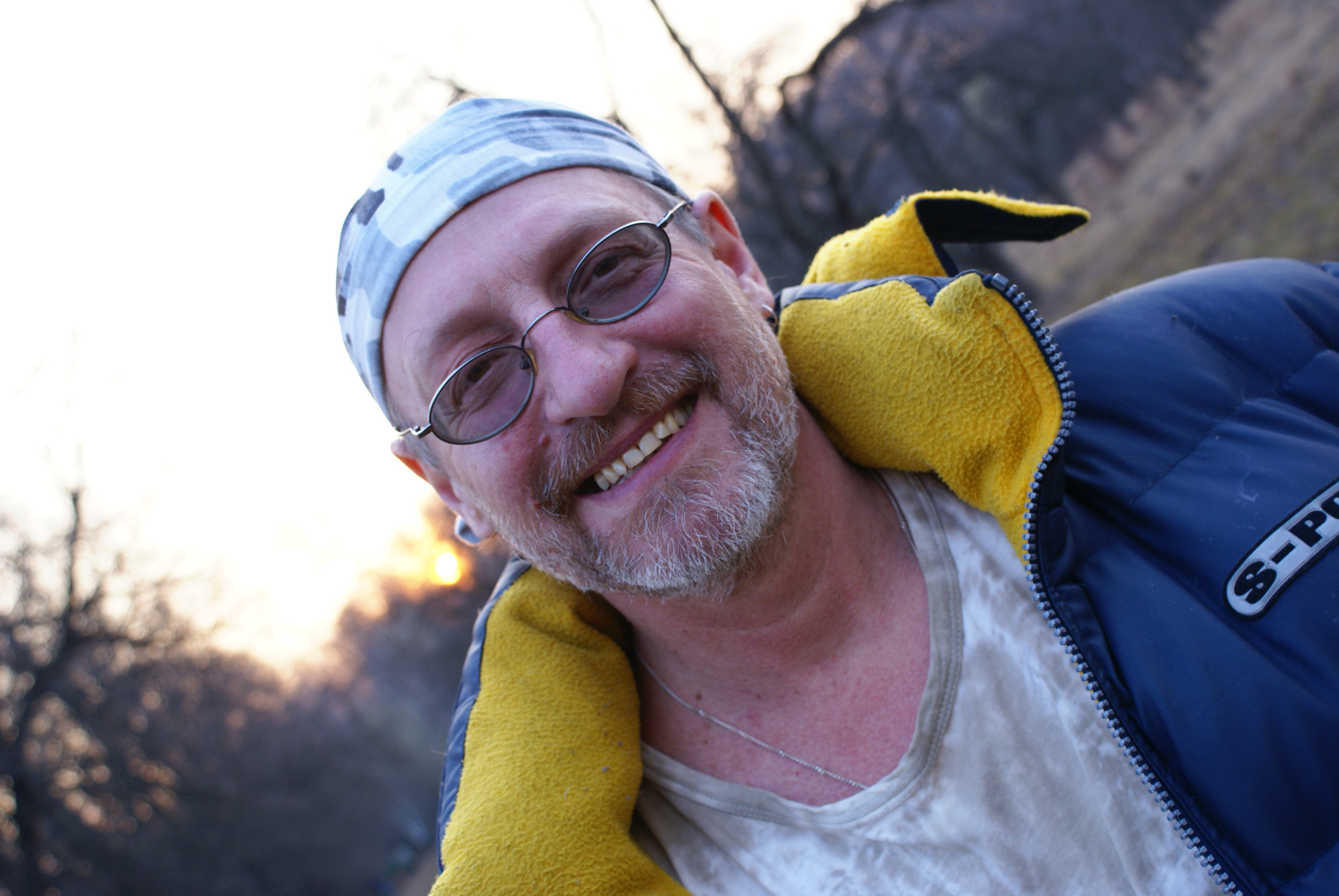 Photo taken in Serebryany Bor Park, Moscow